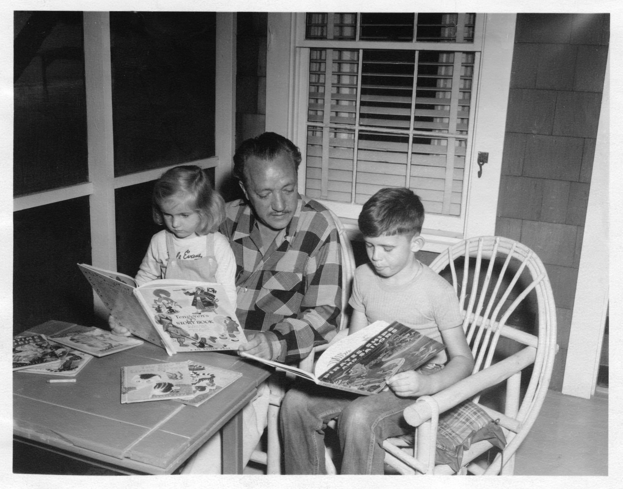 Gustaf Tenggren med bokläsande barn.